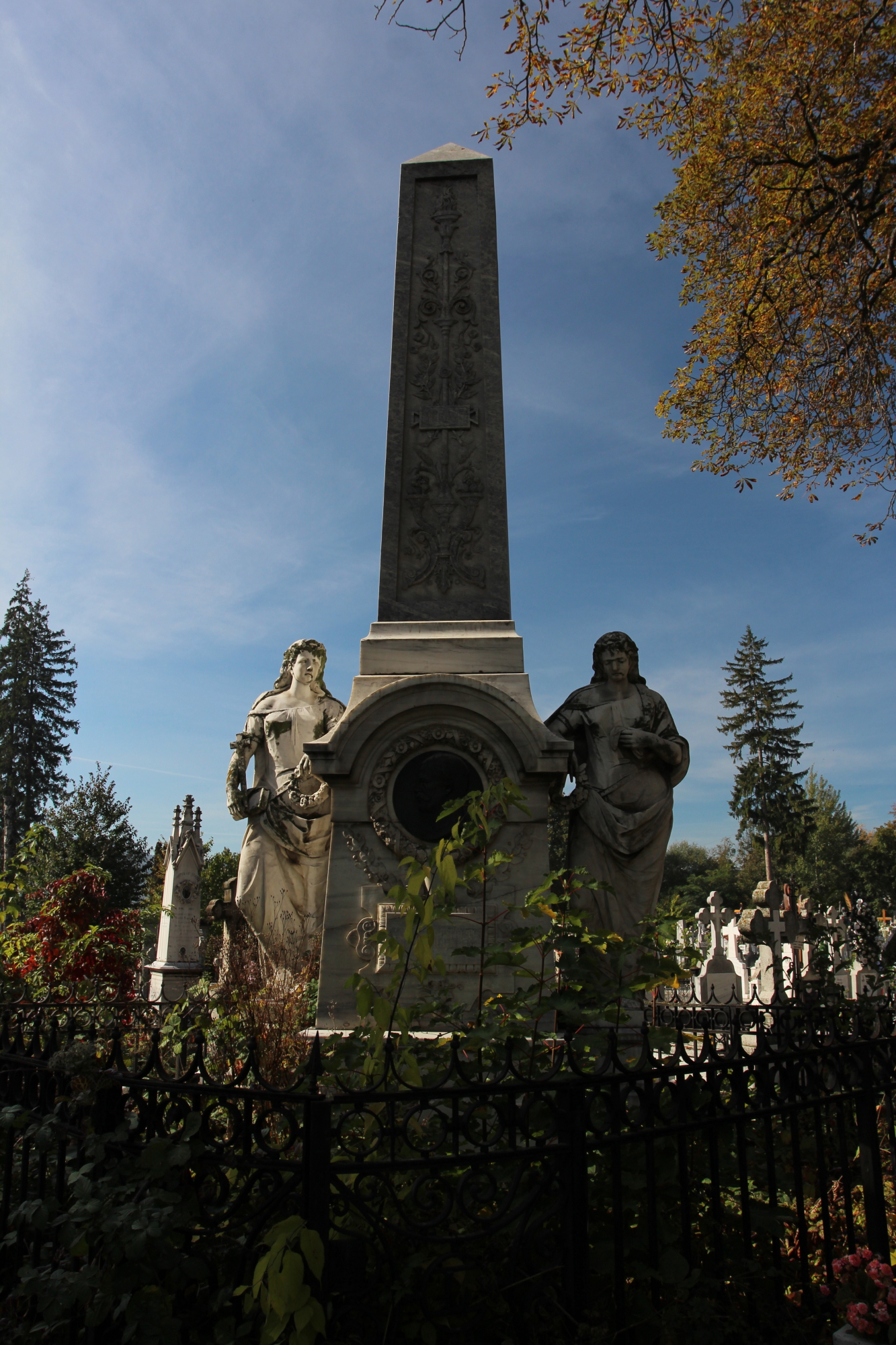 Monument funerar din marmură -Sculy Logothetes